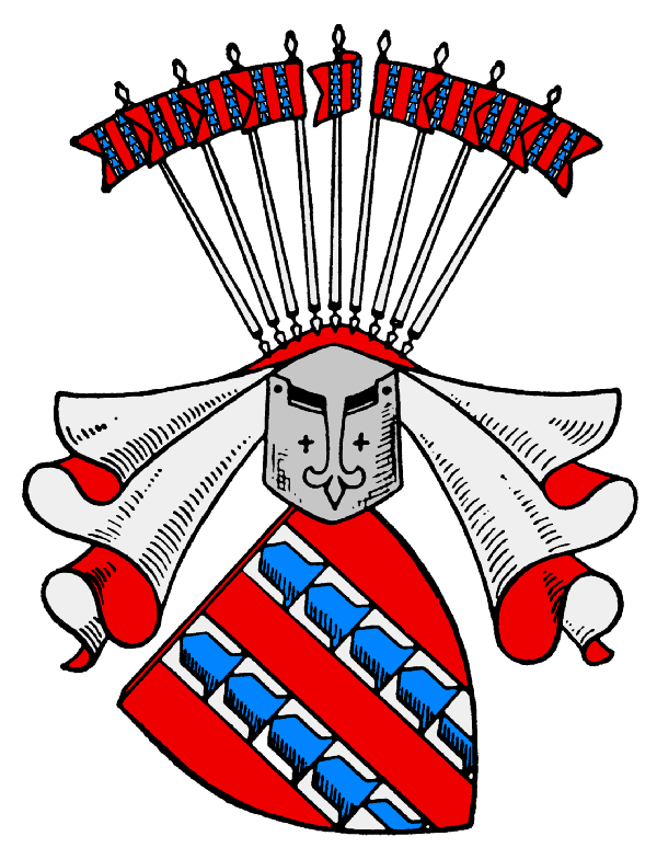 Wappen der Familie von Amelunxen.